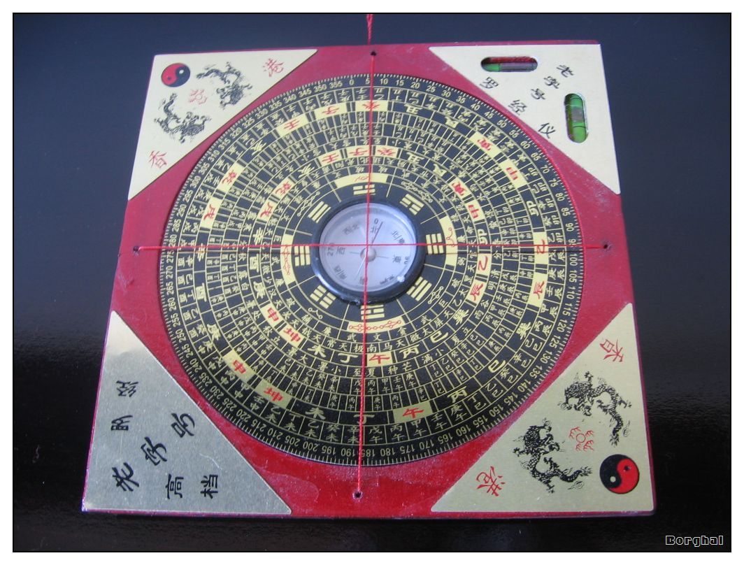 Feng shui Luopan compassFeng shui Luopan compass